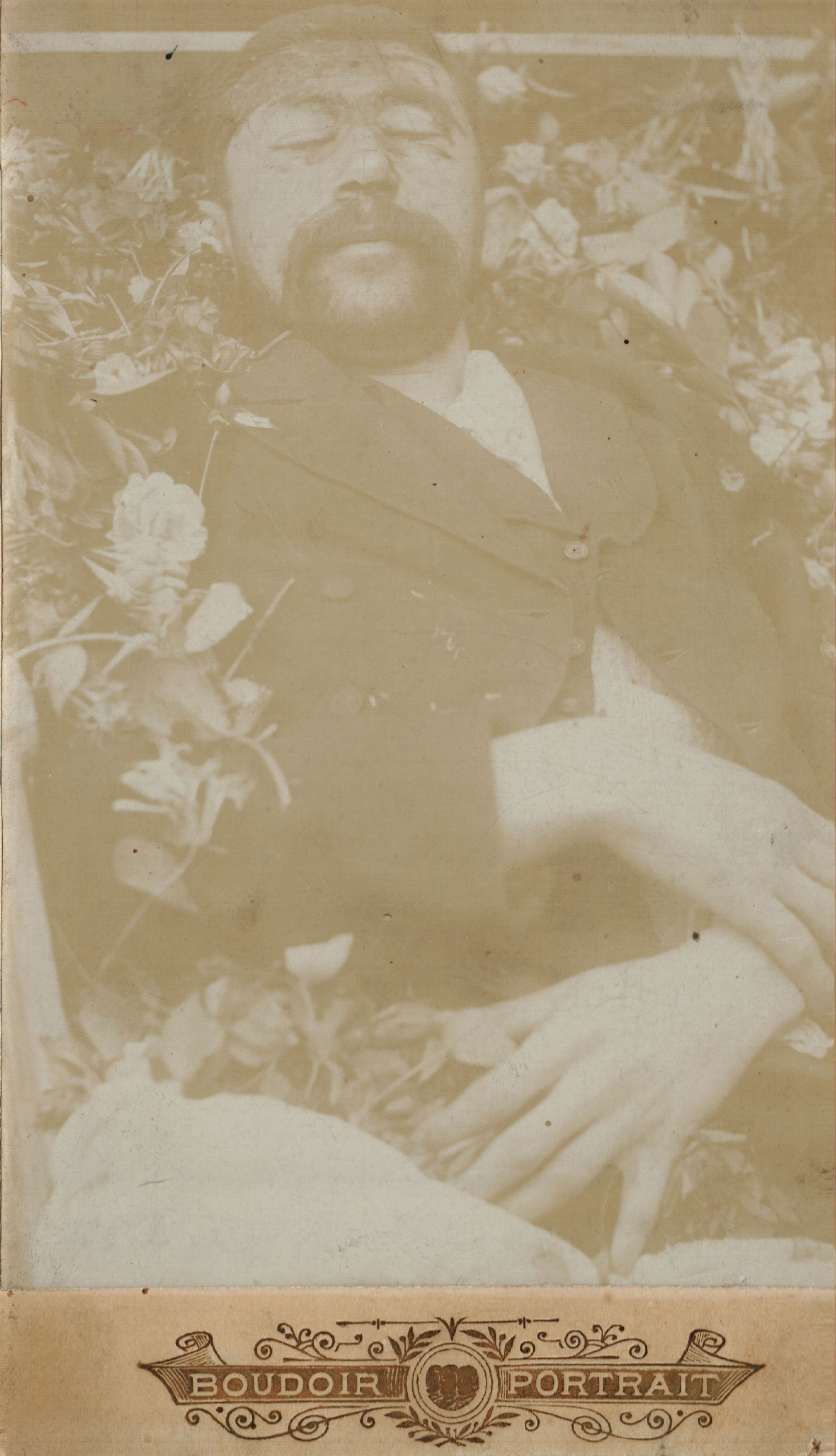 Снимка на Петър Михов.